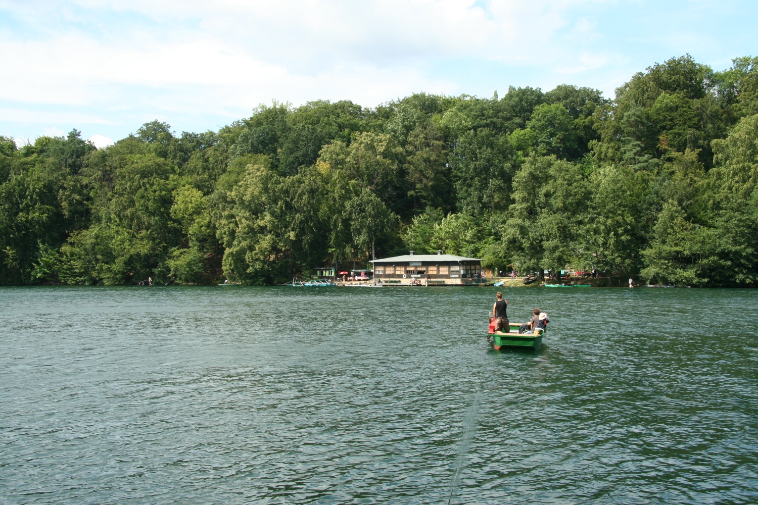 Schmaler Luzin, Fähre Hullerbusch